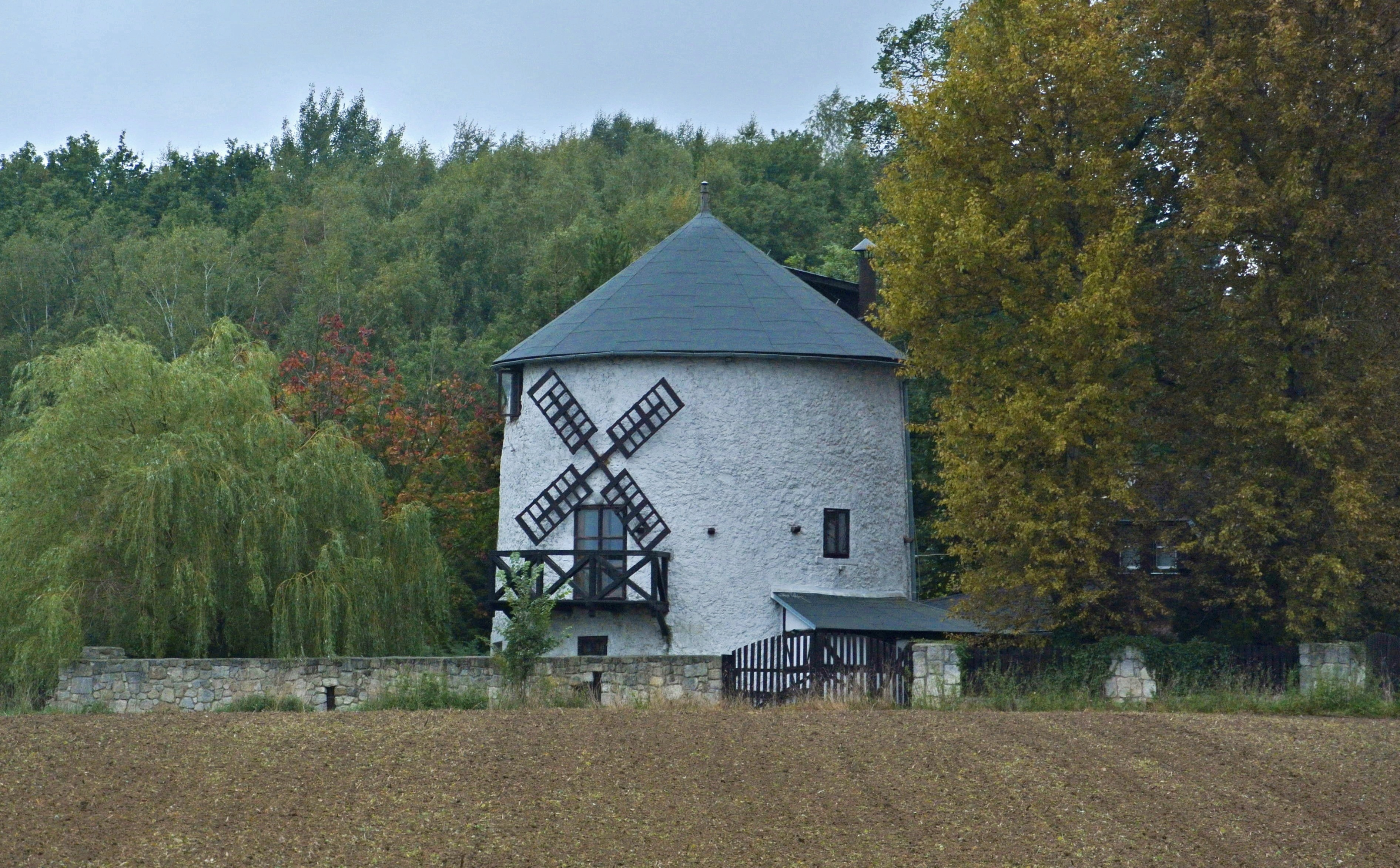 Větrný mlýn, Václavice 91, Václavice (Hrádek nad Nisou).